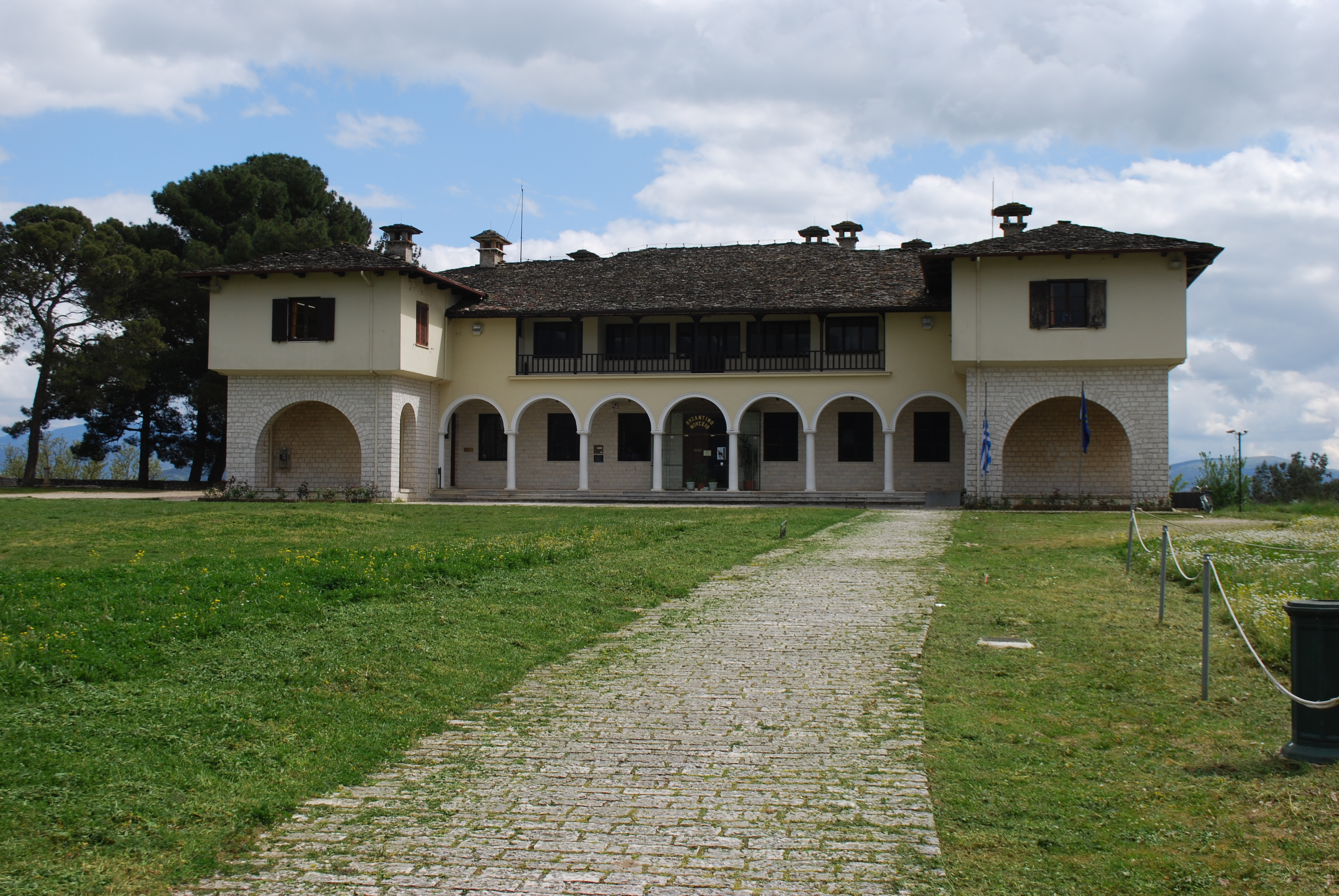 Vue de Ioannina.